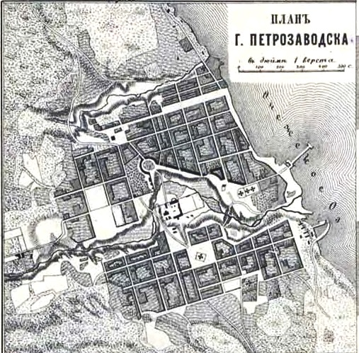 План Петрозаводска на "Карте Олонецкой губернии" в составе "Подробного атласа Российская Империи с планами главных городов, состоящий из 70 карт 1871 г." Издательство: картографическое заведение А. Ильина